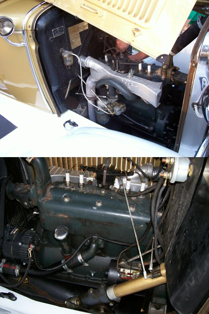 Rambling Wrech, engine